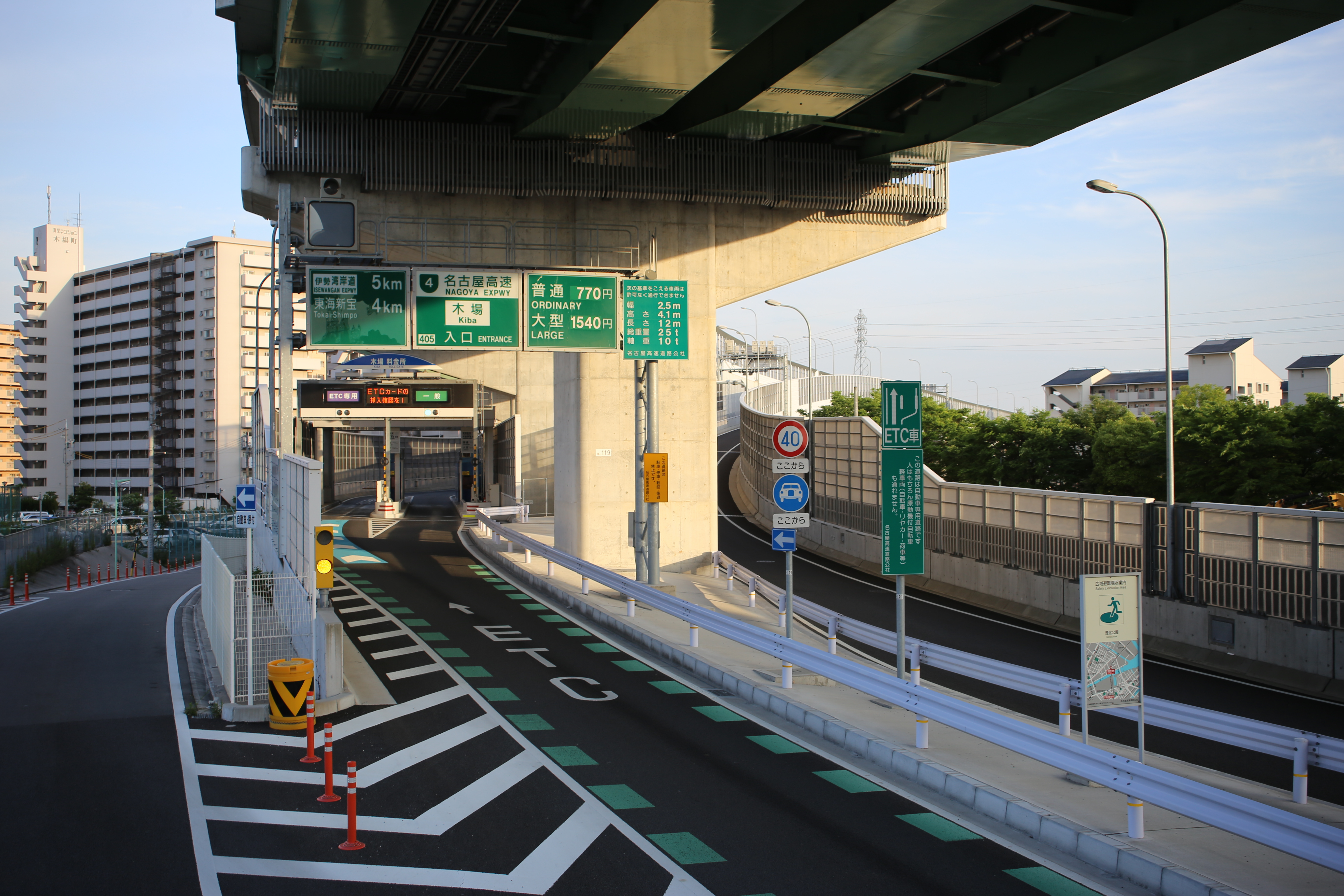 名古屋市港区木場町の名古屋高速道路4号東海線の木場入口を歩道橋踊り場より撮影